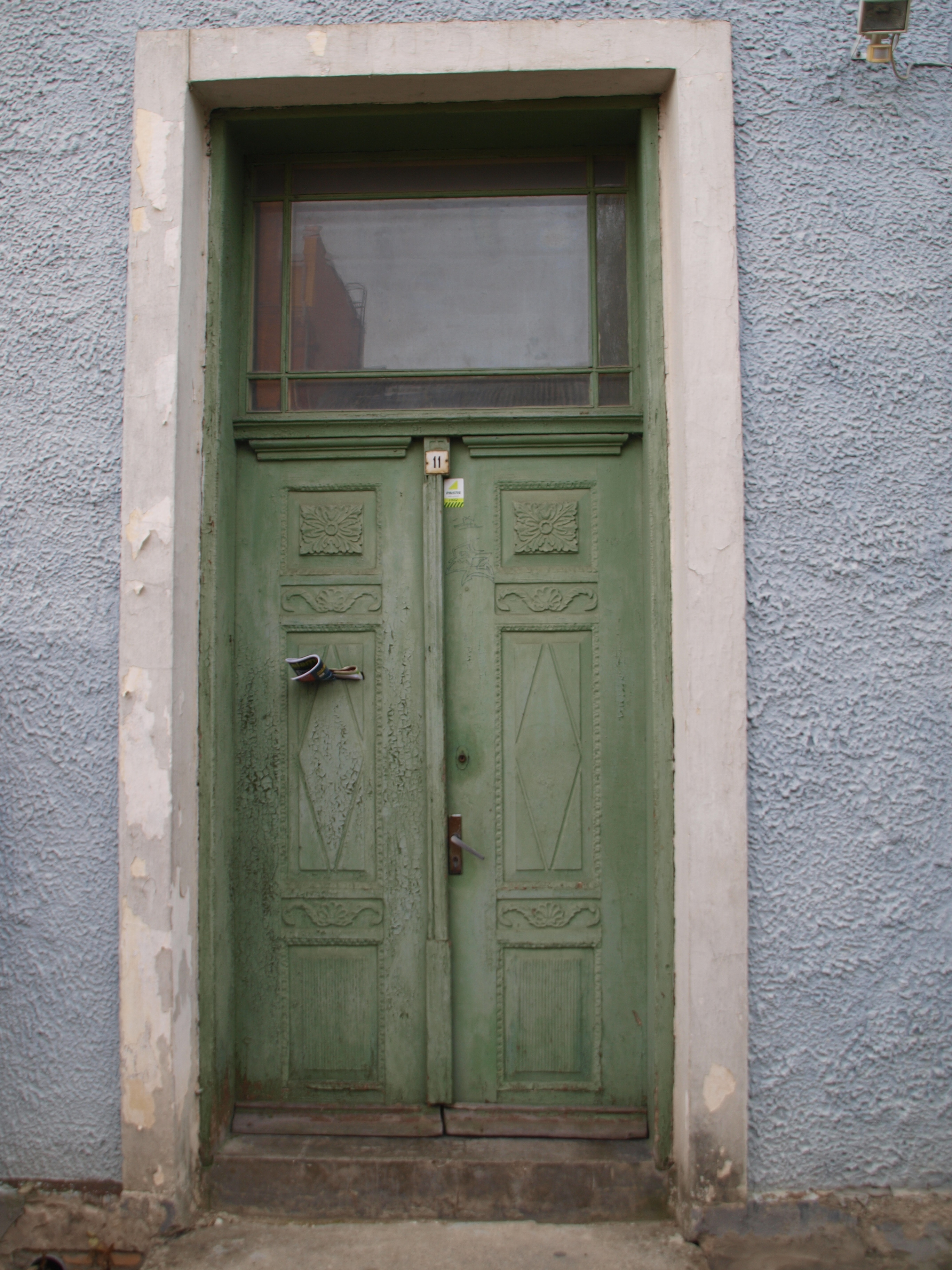 Välisuks Tartus Kalevi 30 , 19.saj.